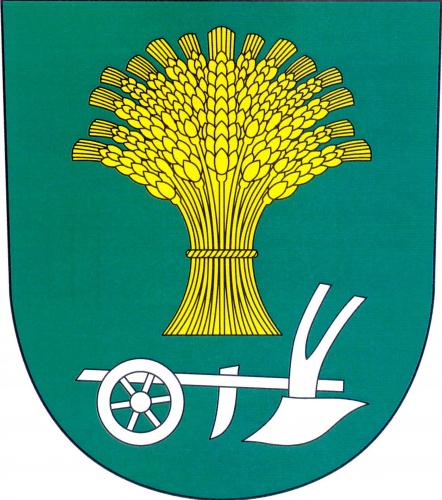 Hodonice, okres Tábor, znak